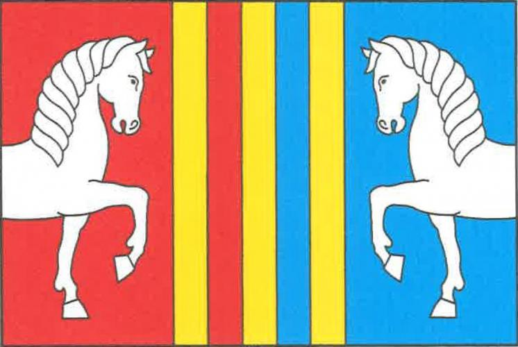 Hřebeč vlajka